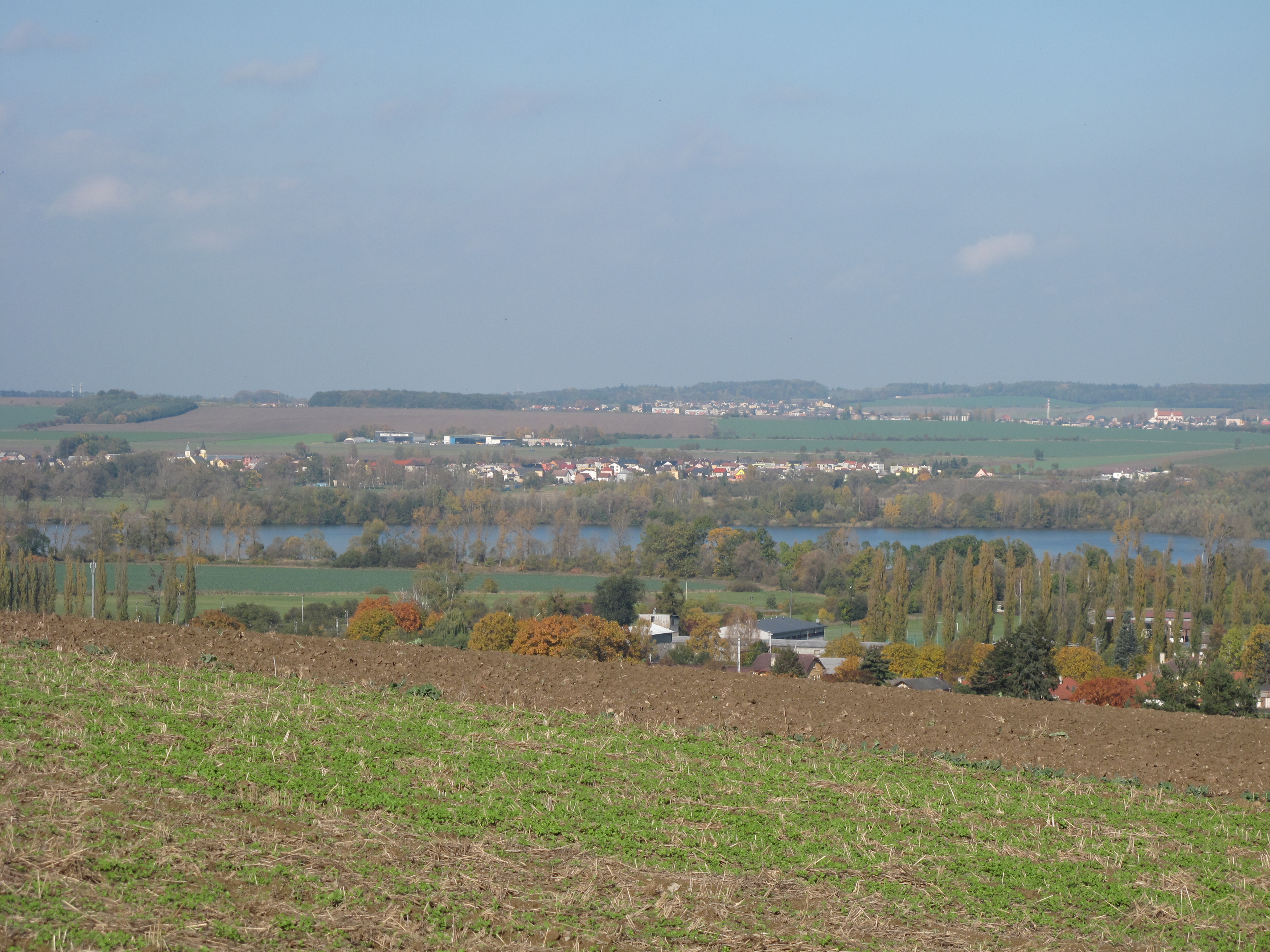 Jezero u Dolního Benešova. Okres Opava, Česká republika.